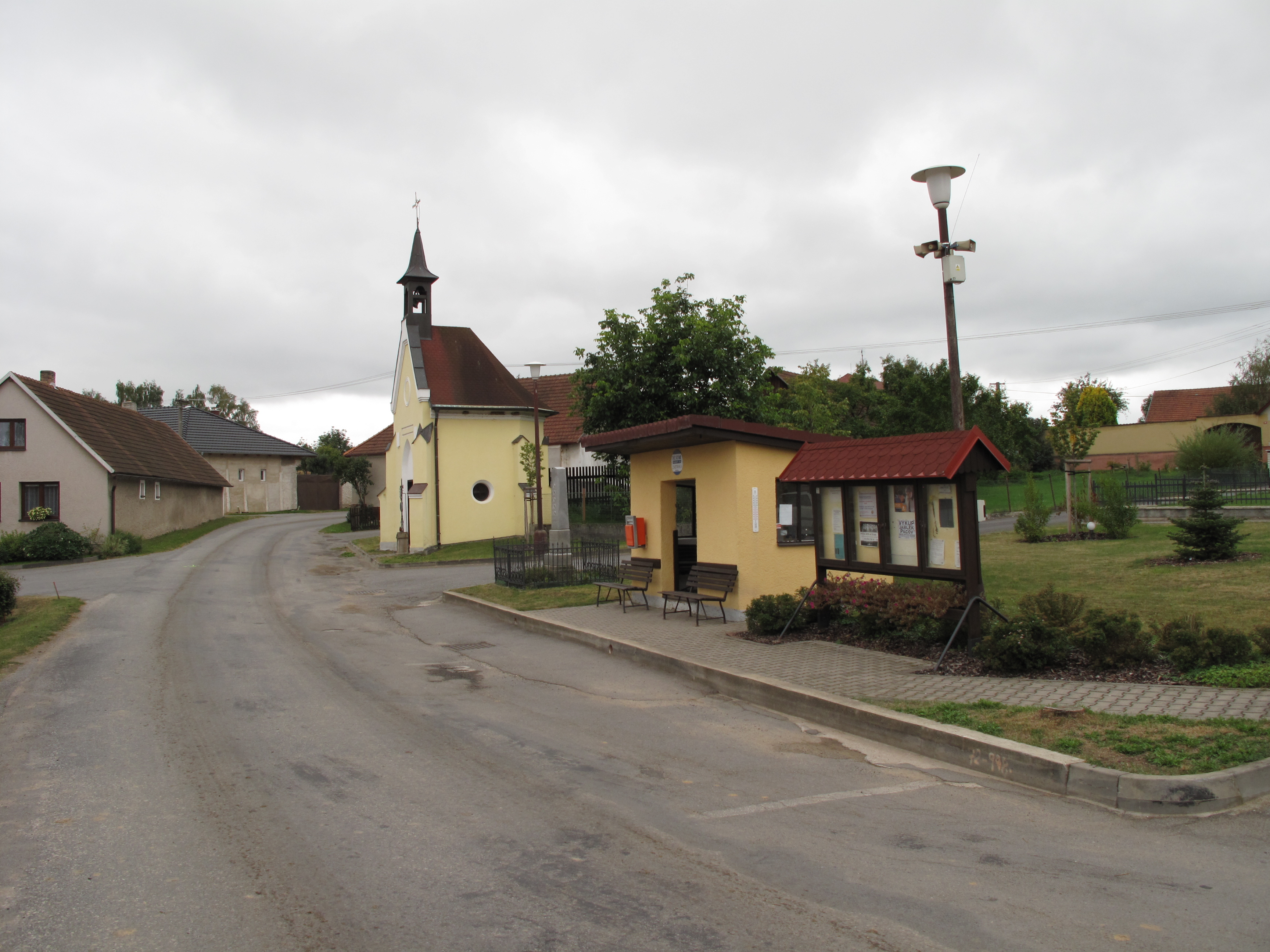 Kaplička v Bořeticích. Okres Pelhřimov, Česká republika.